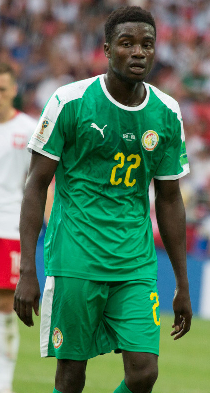 Польша неожиданно проиграла Сенегалу